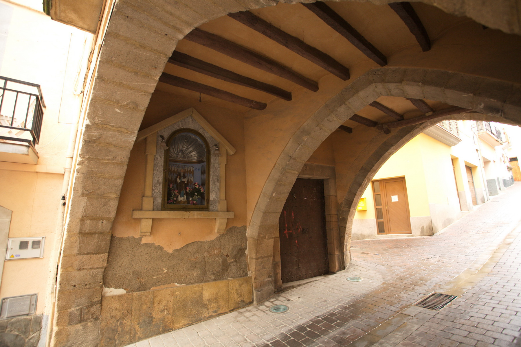 Volta de Sant Llorenç (Vallmoll)